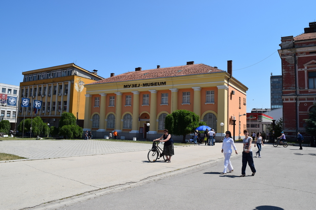 Музеј у Зајечару